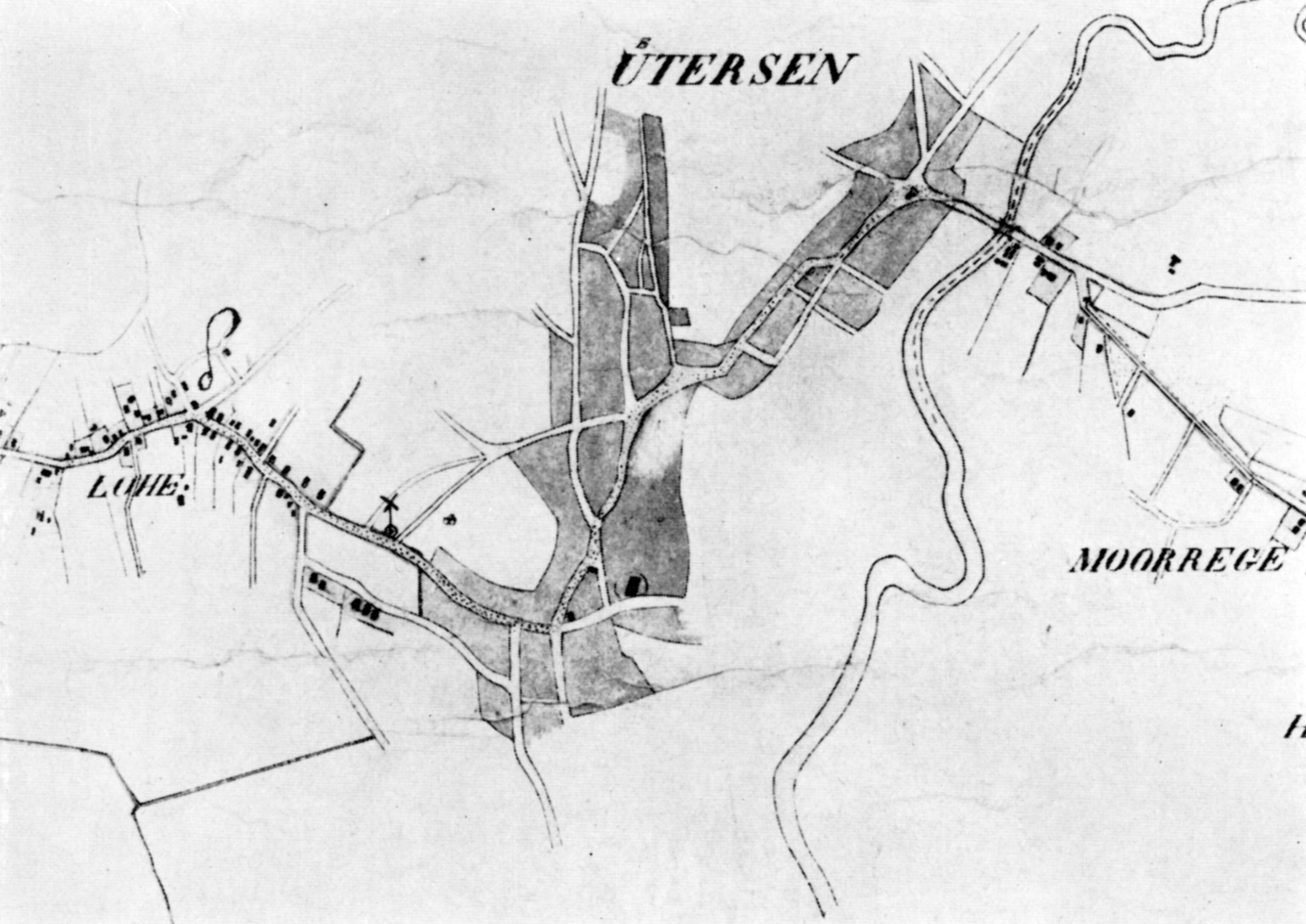 Karte von Uetersen aus dem Jahr 1854